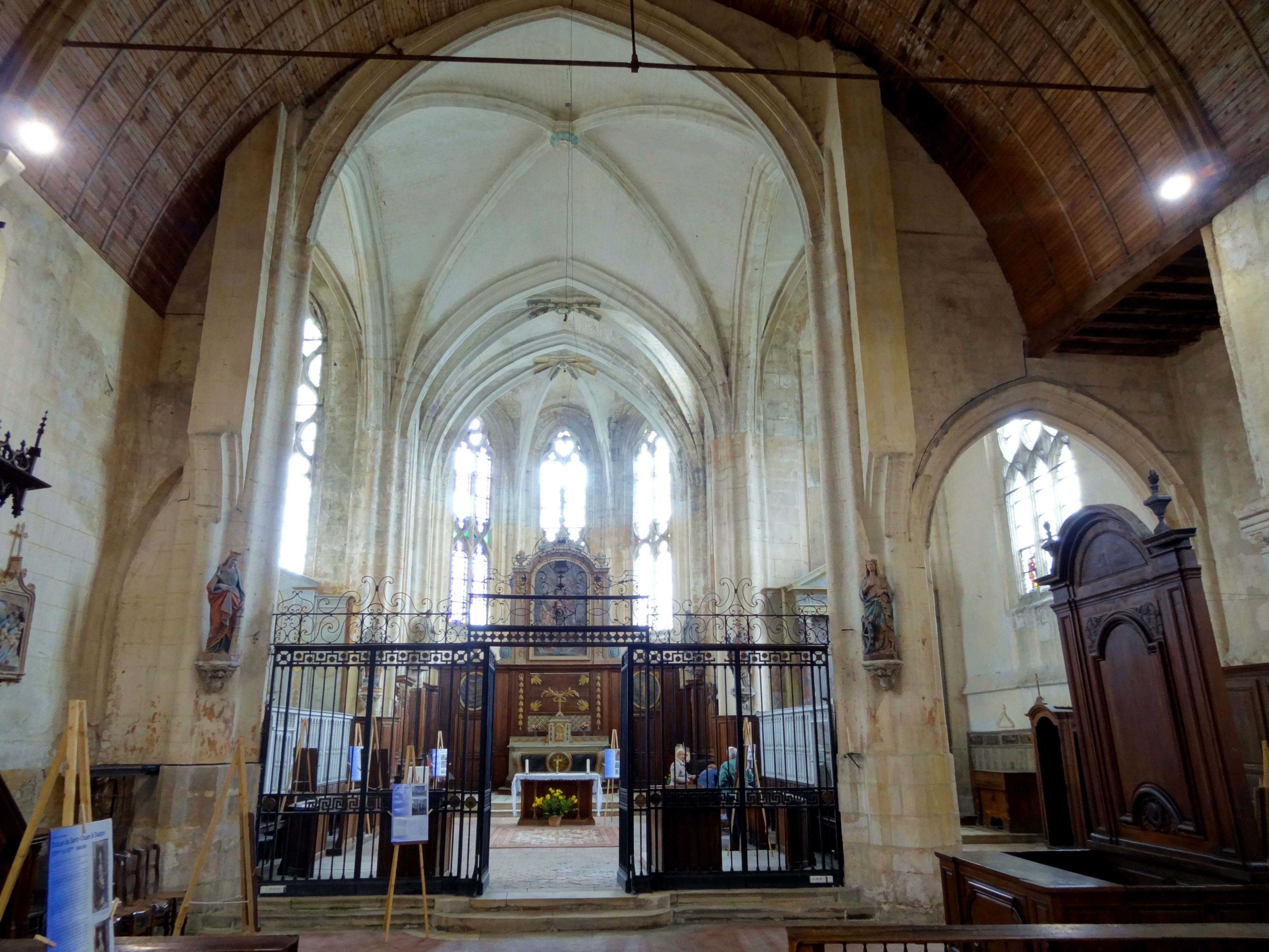 Intérieur de l'église - voir titre.